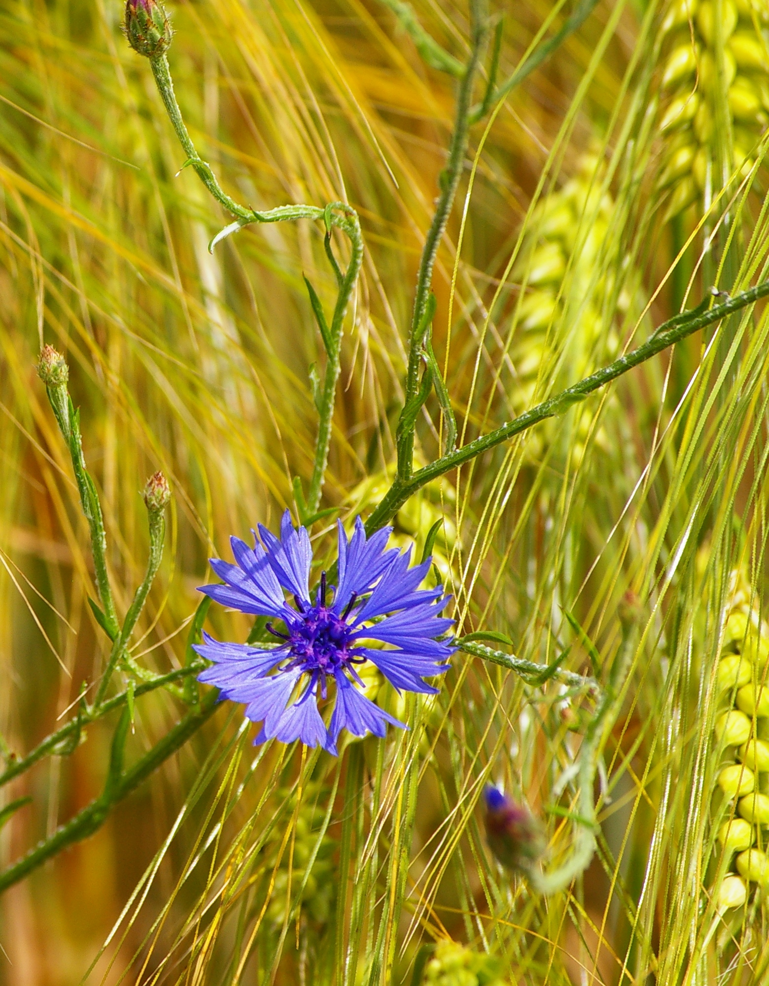 Kornblume in einem Weizenfeld